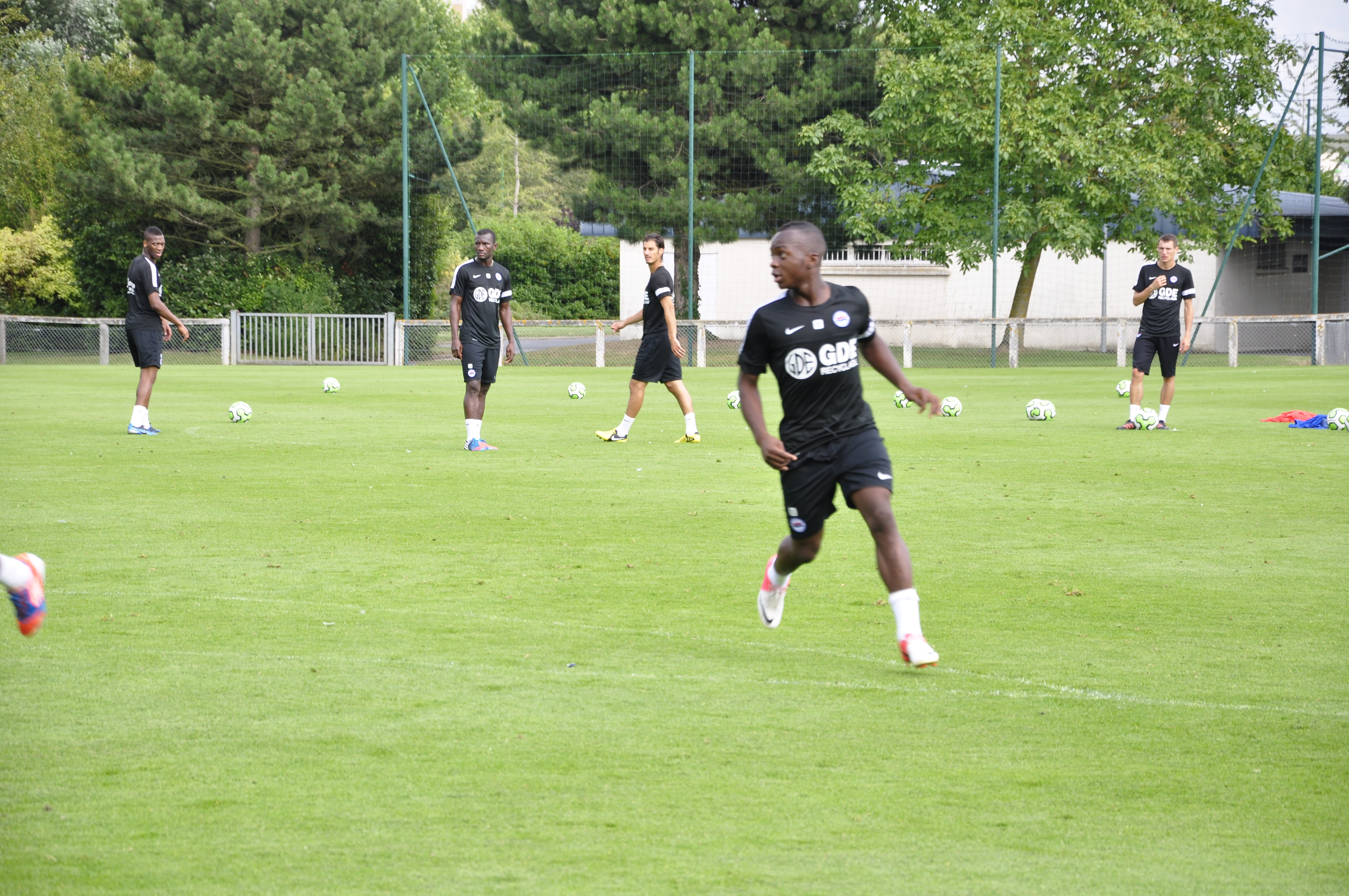 Neeskens Kebano lors de son premier entrainement avec le SM Caen